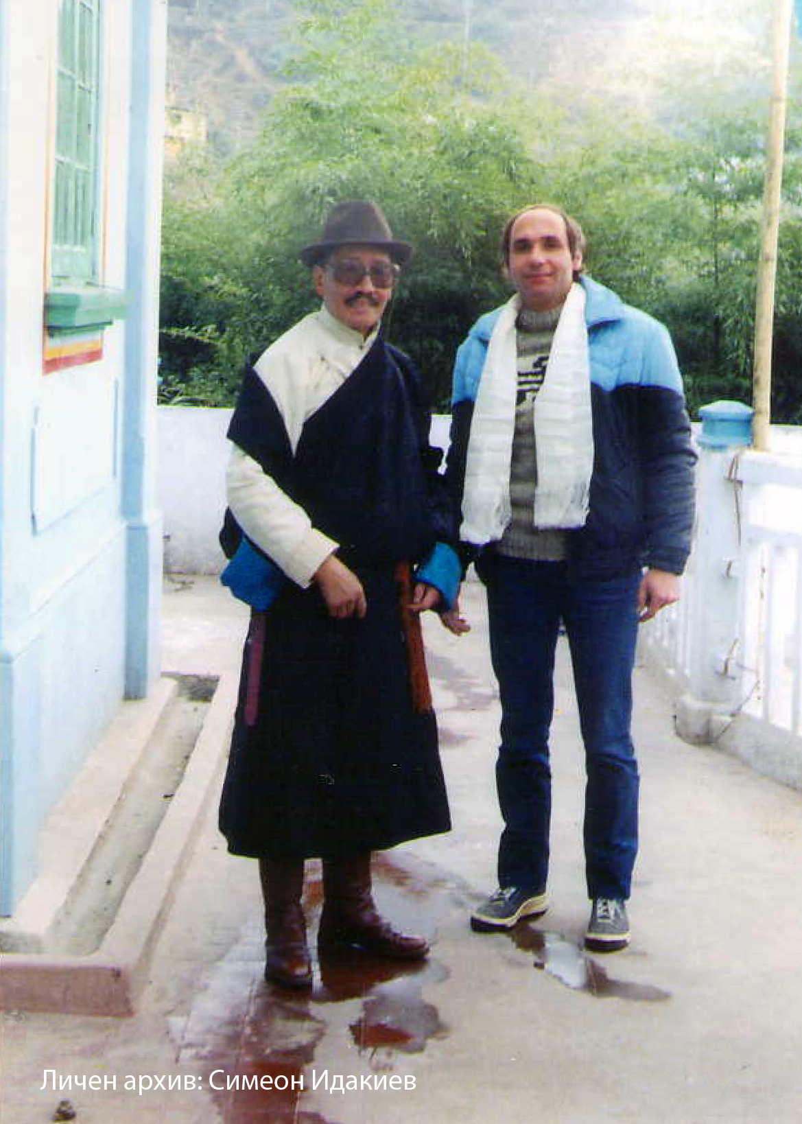 Среща с Тенсинг Норгей /Непал/